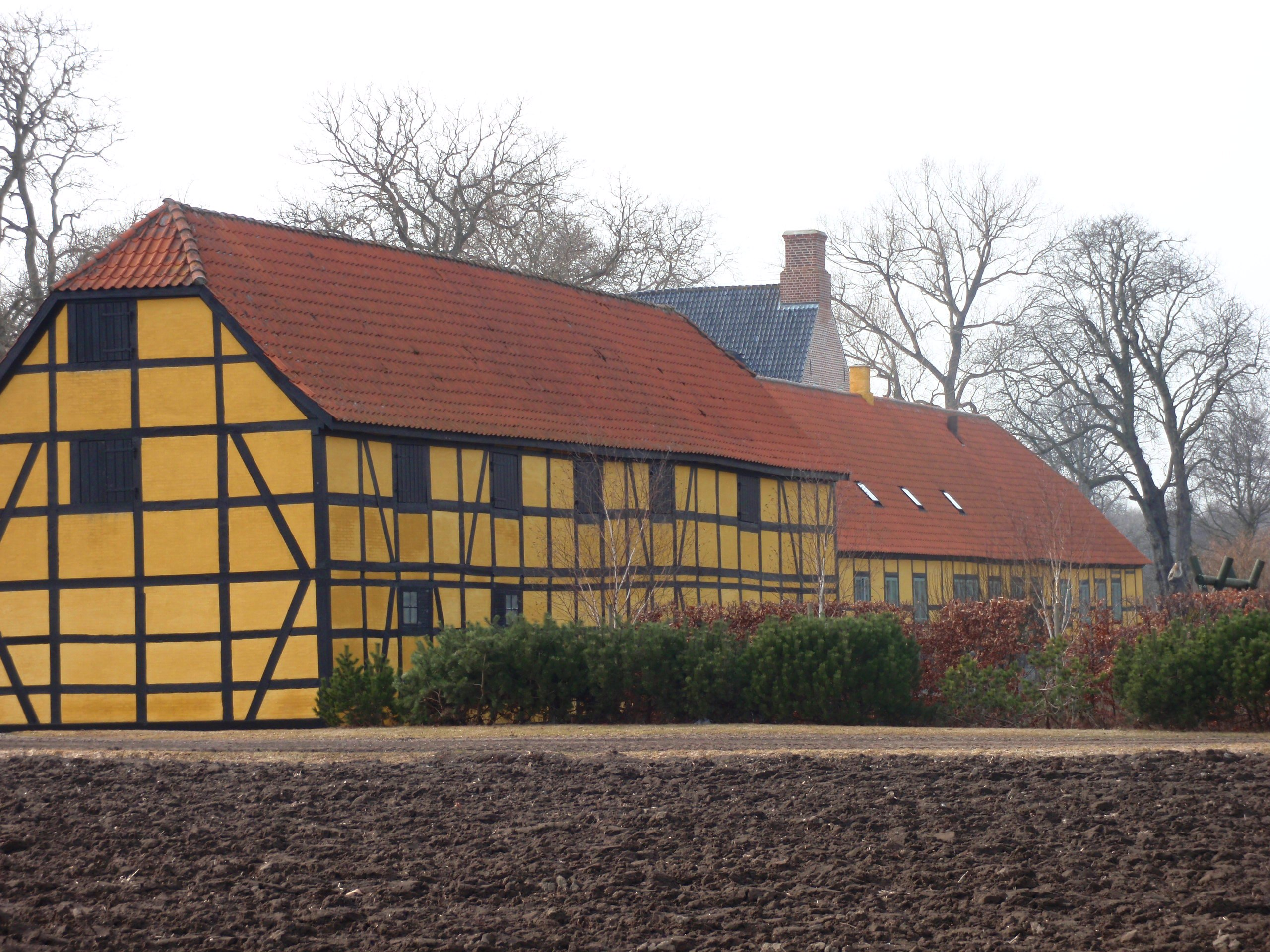 Herregården Bramsløkke, St. Musse, Guldborgsund Kommune